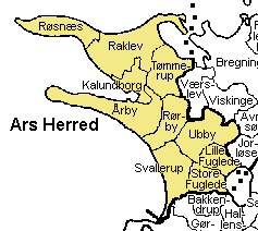 Ars Herred Holbæk Amt , Denmark.